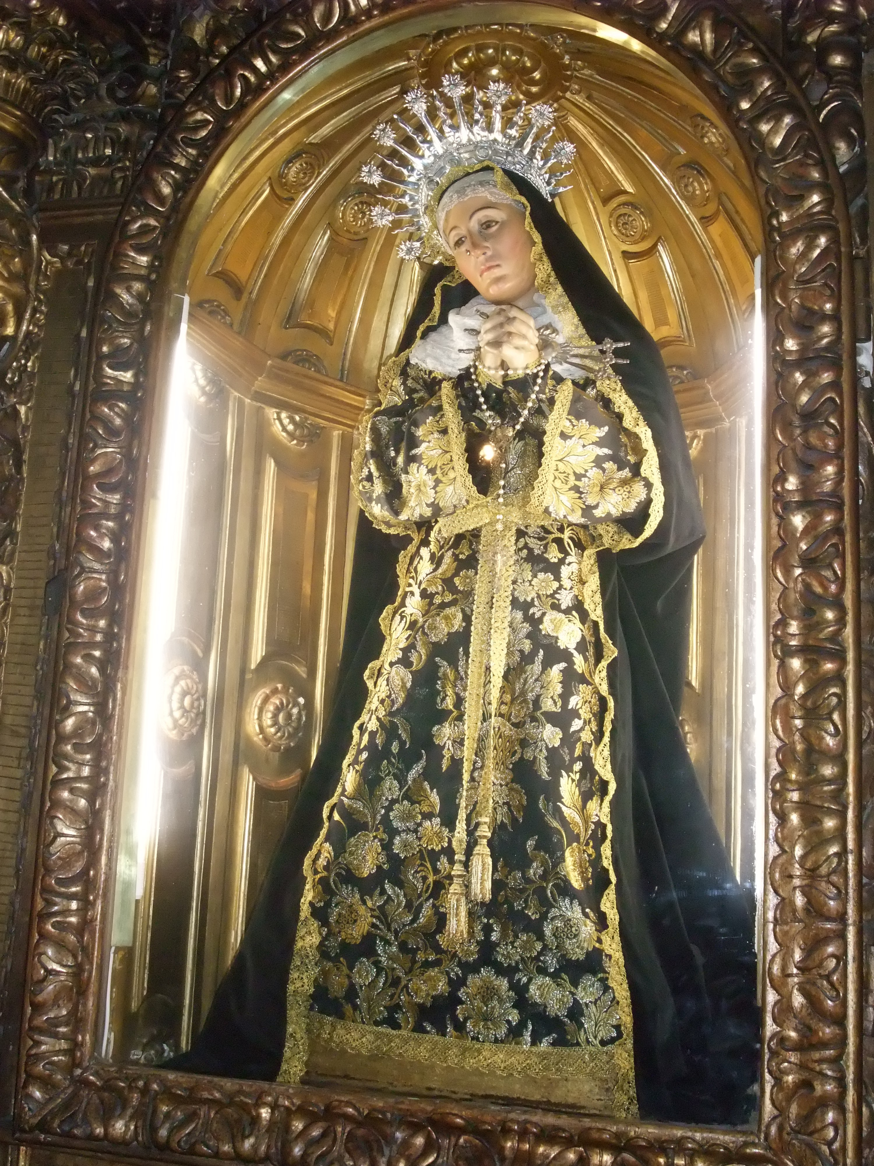 Bilbao (Vizcaya)-Iglesia de los Santos Juanes-6-Virgen Dolorosa (Raimundo Capuz, 1690)